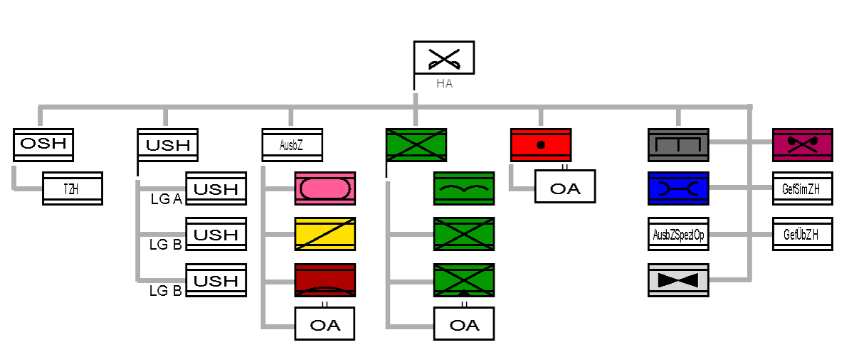 Gliederung Heeresamt des deutschen Heeres. Zielstruktur 2010.